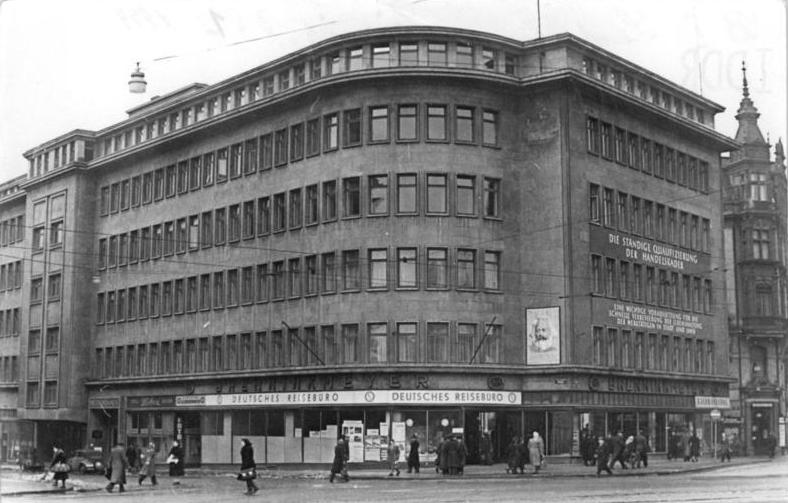 Leipzig, Universität, Gebäude im Stadtzentrum Zentralbild Illner Str-Ho 26.1.1954. Hochschule für Binnenhandel im Leipzig.Zu din Specialhochschulen die auf Beschluss des Ministerrates der Deutschen DemokratischenRepublik zur Heranbildung wissenschaftlich-technischer Kader neu gegründet werden, gehört die Hochschule für Binnenhandel. 140 Studenten begannen in September 1953 an diesen Institut ihr vierjähriges Studium. Gleichzeitig besuchen 250 Kollegen den staatlichen und genossenschaftlichen Handele die fünf Monat dauernden Kurslehrgänge der Hochschule, Um ihr fachliches Wissen zu erweitern.UBz: Das Gebäude der Hochschule im Zentrum von Leipzig.